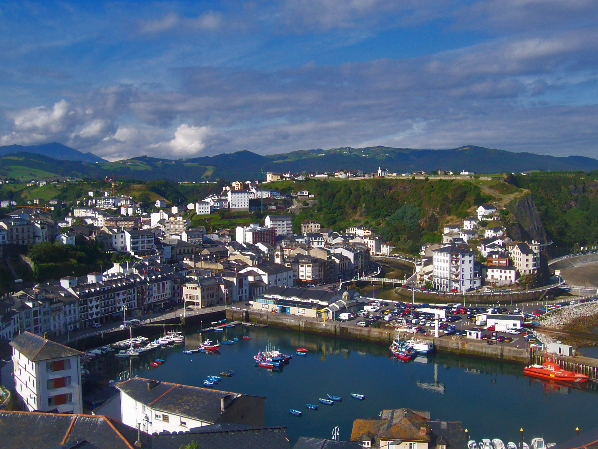 Luarca